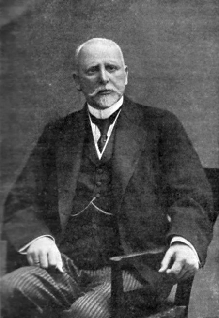 Фёдор Егорович Енакиев (1852 - 1915) - промышленник, один из основателей Енакиевского металлургического завода.